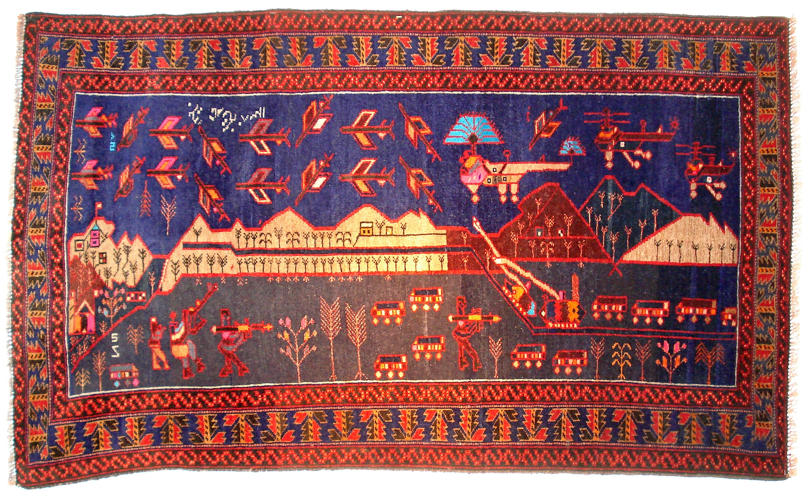 Afghanischer Kriegsteppich aus Westafghanistan, Maße 90 x 150 cm